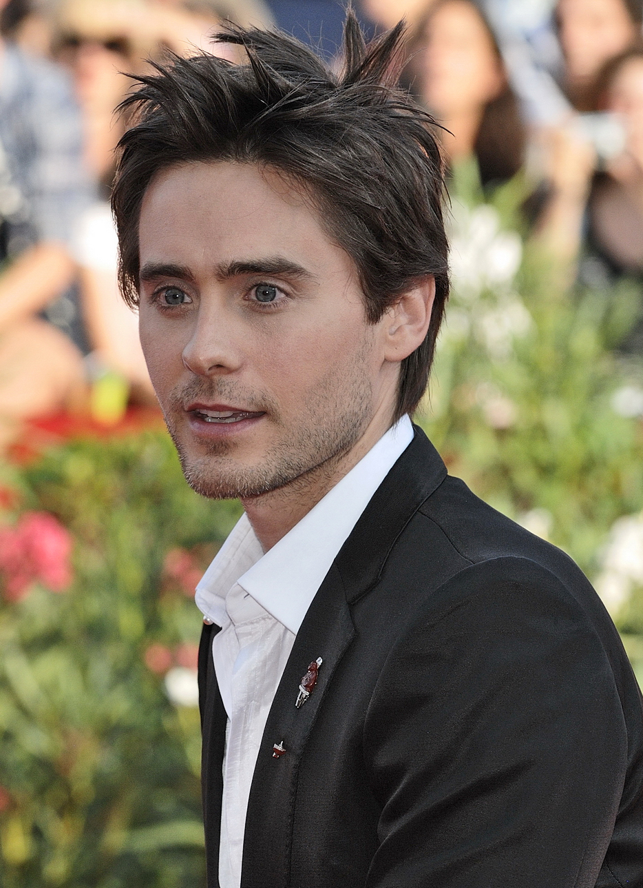 66ème Festival du Cinéma de Venise (Mostra), 10ème jour (11/09/2009) Tapis rouge avec Jared Leto, Diane Kruger, Sarah Polley et le réalisateur Jaco Van Dormel pour le film : MR. NOBODY